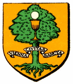 Blason de la ville de Vienne (Isère).